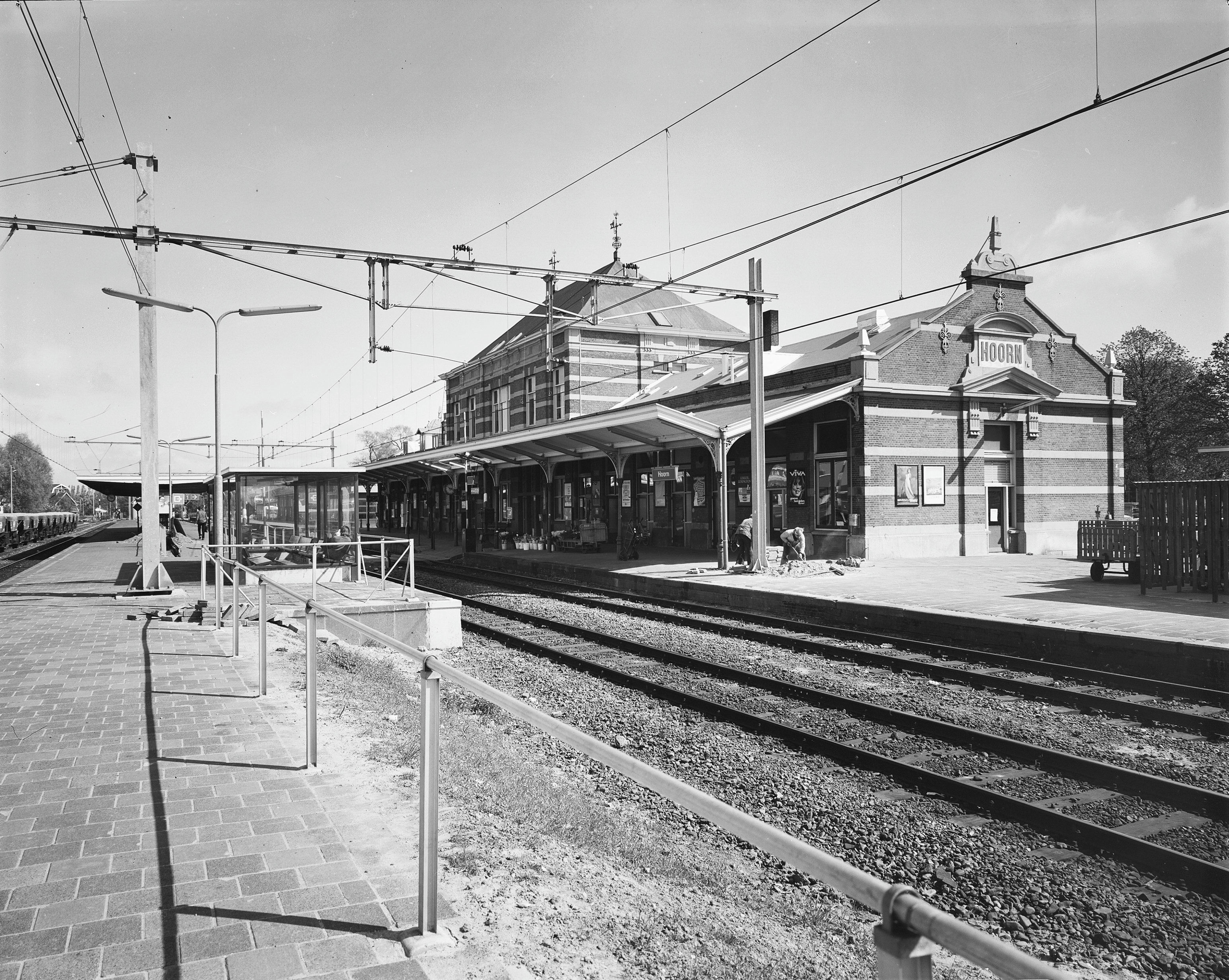 Station: achter- en zijgevel